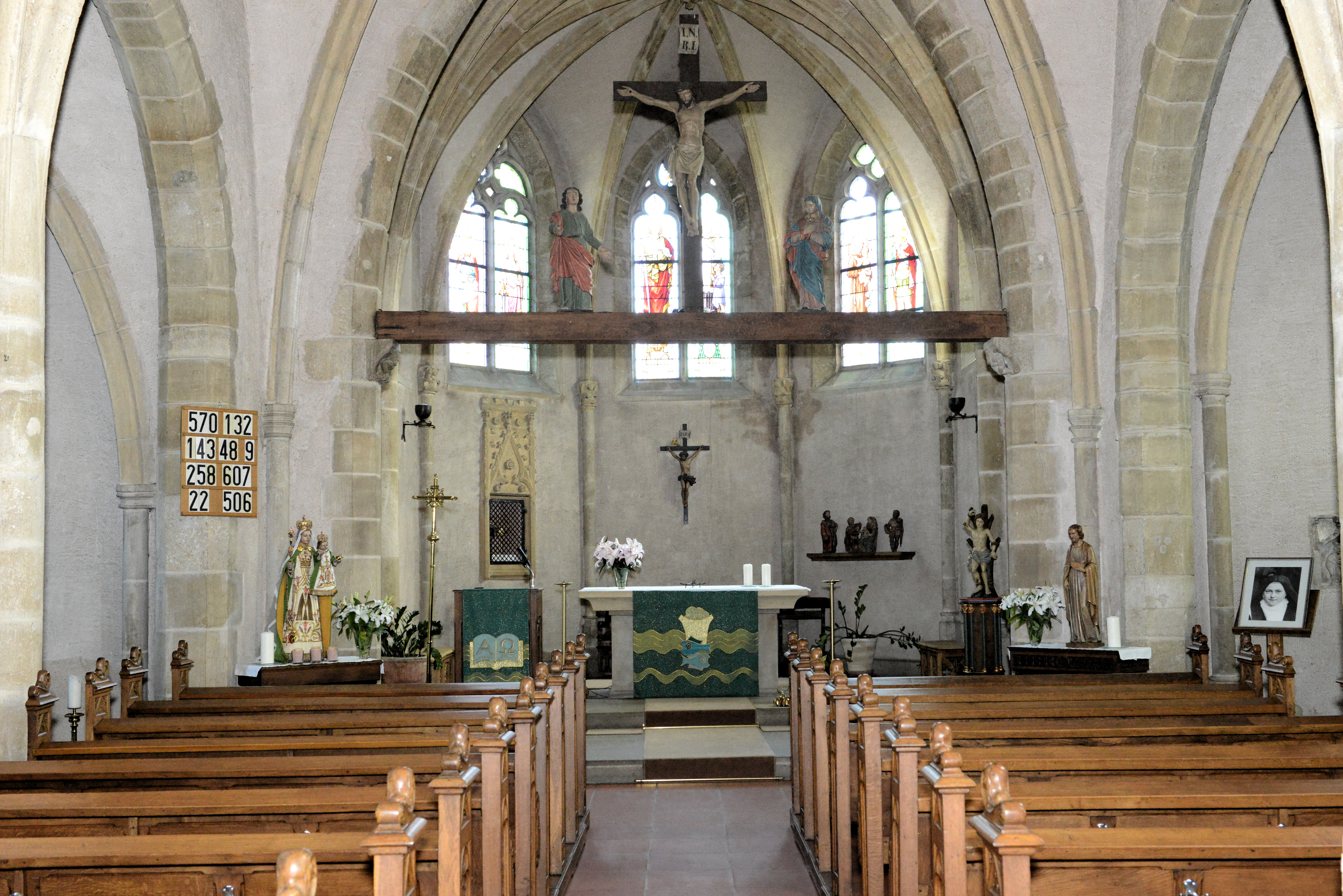 E Bléck an d'Kierch zu Waldbriedemes.